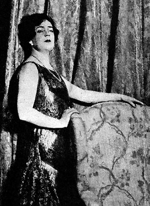 Bullan Weijden